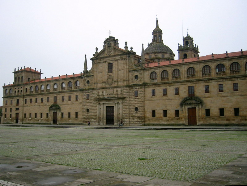 Colegio de Nuestra Señora la Antigua Monforte de Lemos, Lugo (España) Fotografía tomada el 5 de Noviembre de 2005 con mi cámara Canon IXUS V2.